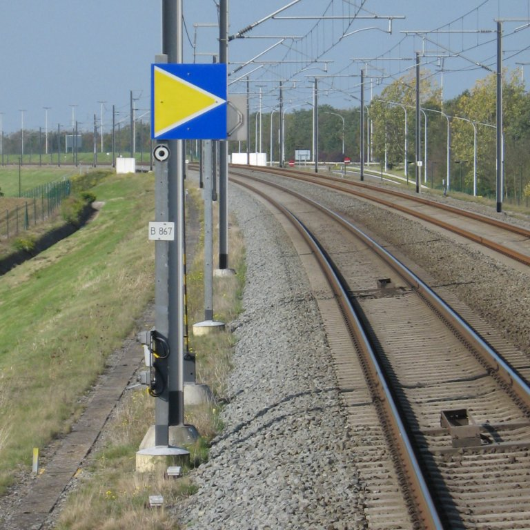 Grand repère d'arrêt (utilisé sur les lignes à grande vitesse d'Infrabel)